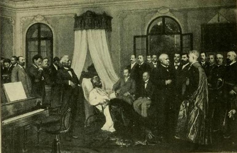 Últimos dias de Carlos Gomes - Intendência Municipal de Belém.